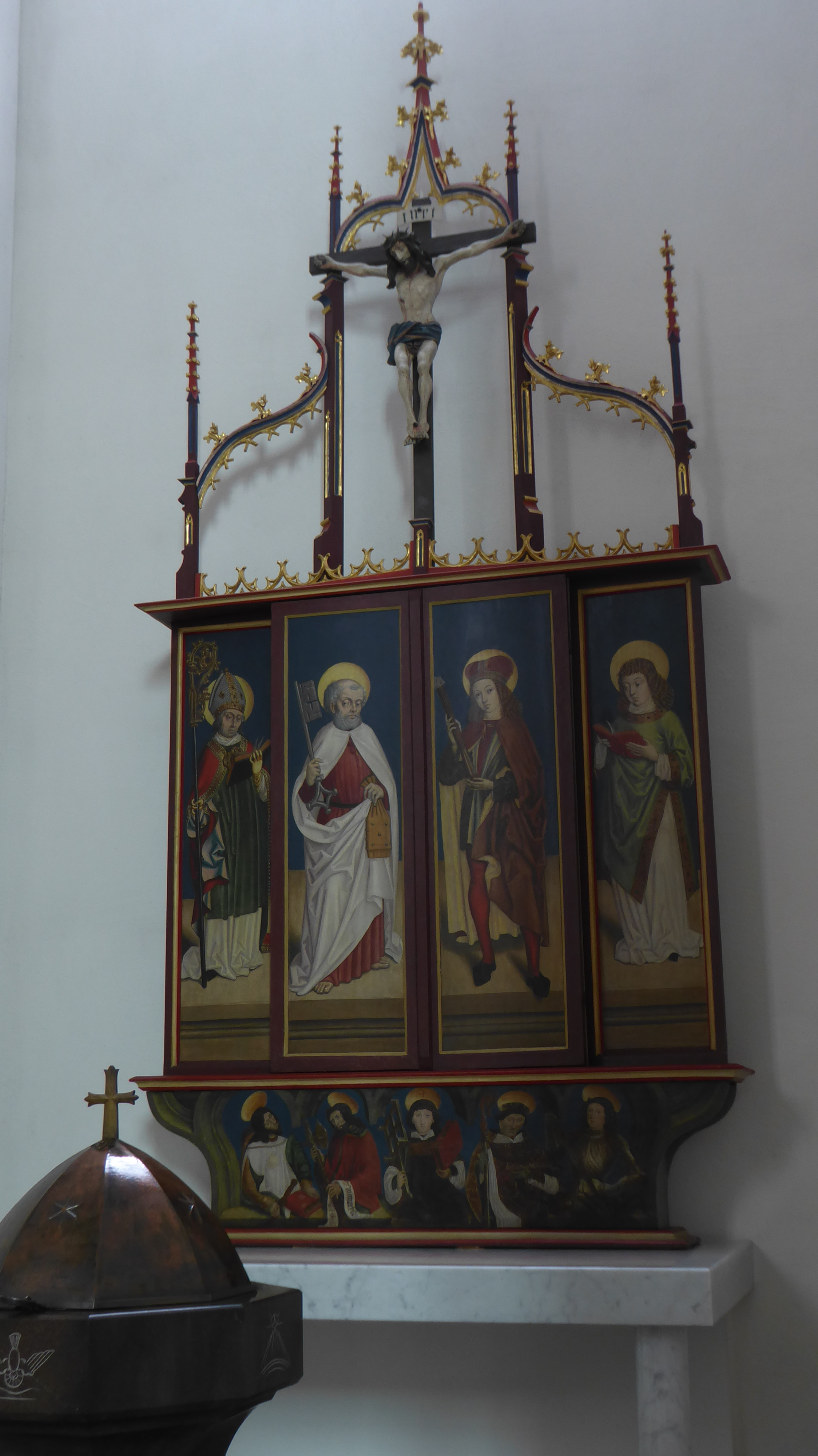 Pfarrkirche Ruggell FL: gotischer Flügelaltar in der Taufkapelle